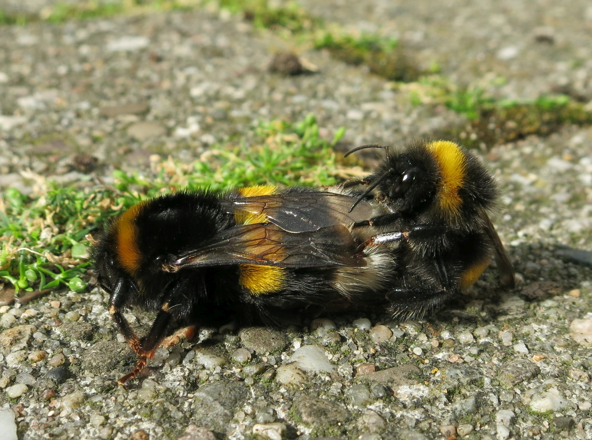 Dunkle Erdhummeln (bombus terrestris) bei der Kopulation